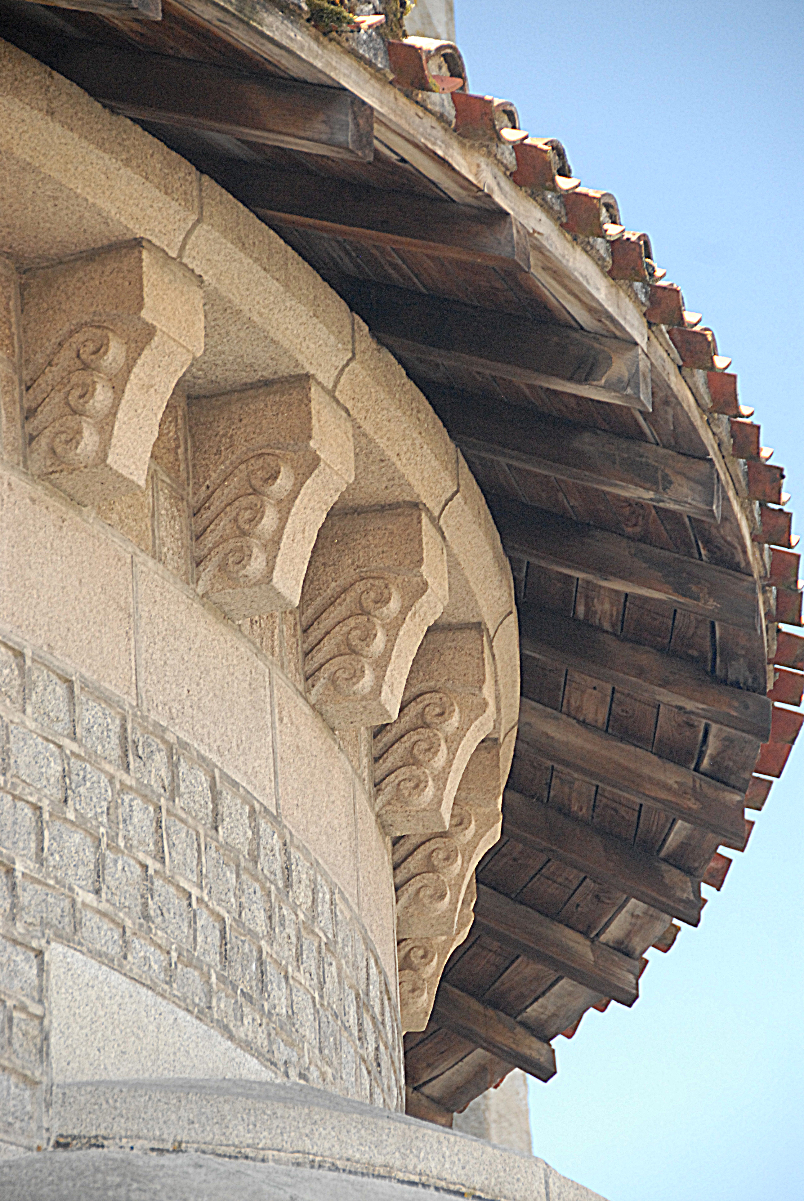 Stiftskirche St.-Léonard-de-Noblat, Grabeskapelle, Traufe, Hobelspan- Kragsteine